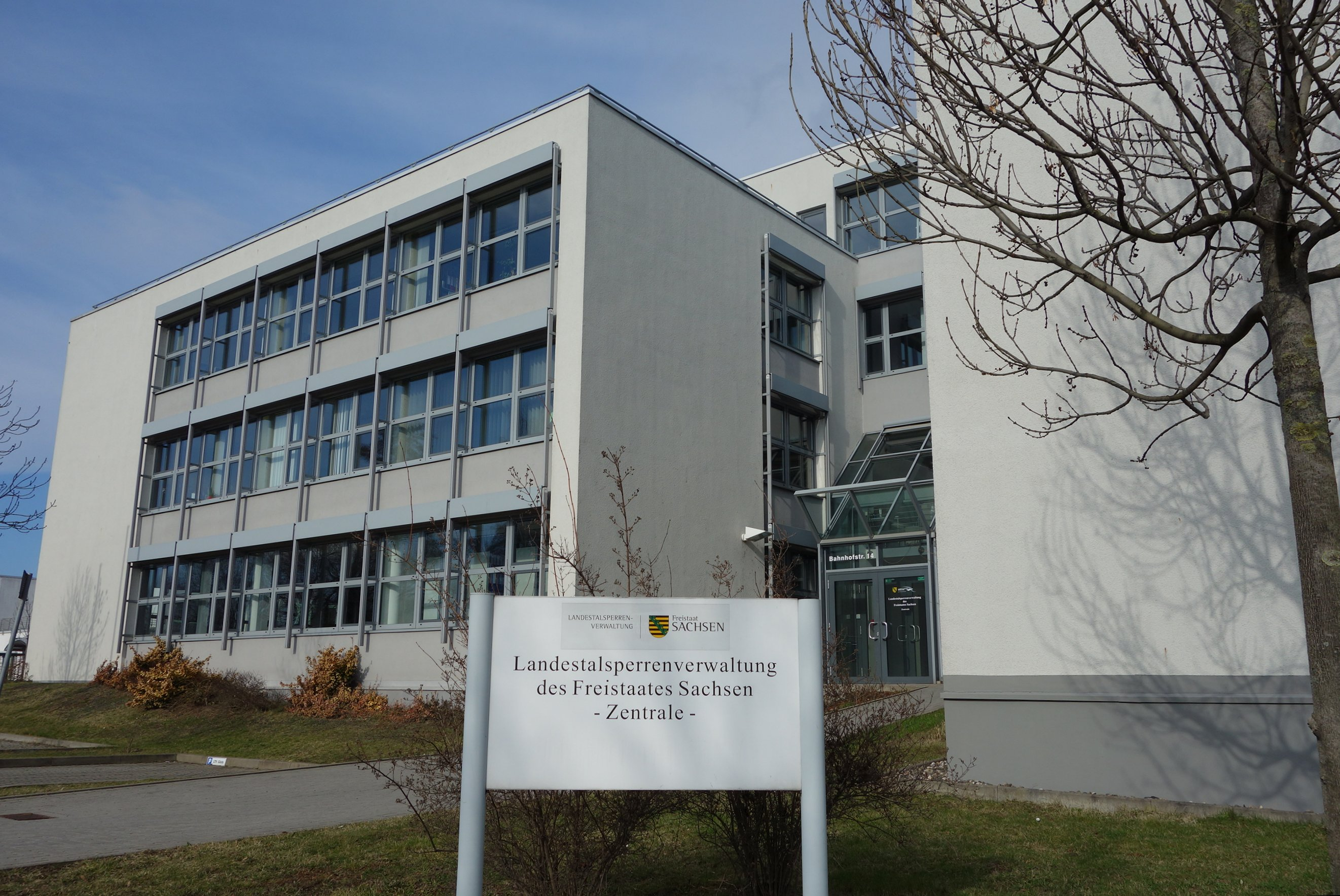 Die Talsperrenverwaltung in Pirna, Bahnhofstraße